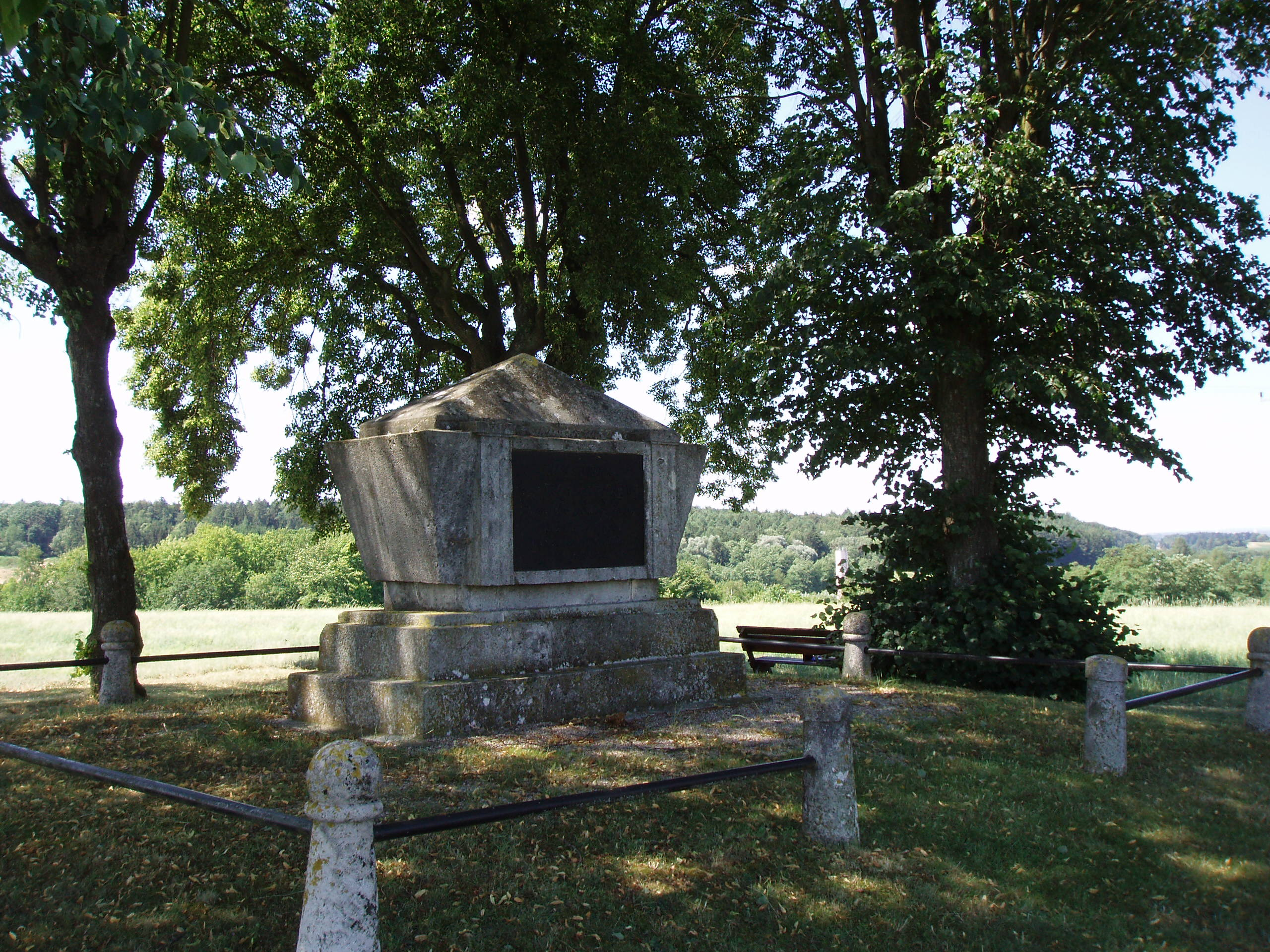 Denkmal in Form eines Steinsarkophags zum Gedenken an den am 27. Juni 1800 gefallenen französischen Nationalhelden La Tour d’Auvergne. Das mannshohe Denkmal steht auf einer Anhöhe nahe Oberhausen bei Neuburg an der Donau, das Grundstück wurde damals vom französischen Staat erworben und gehört ihm noch heute.